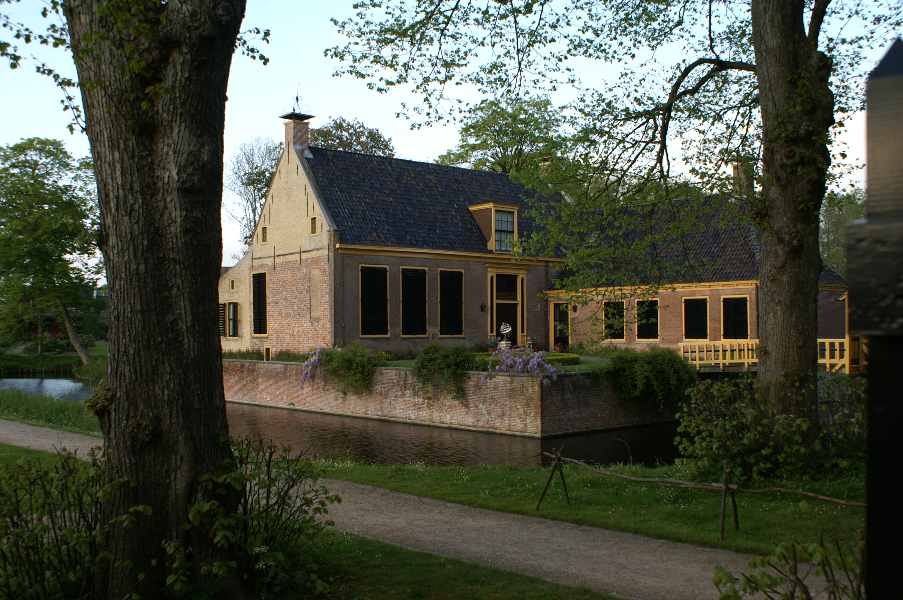 De Dekemastate te Jelsum.